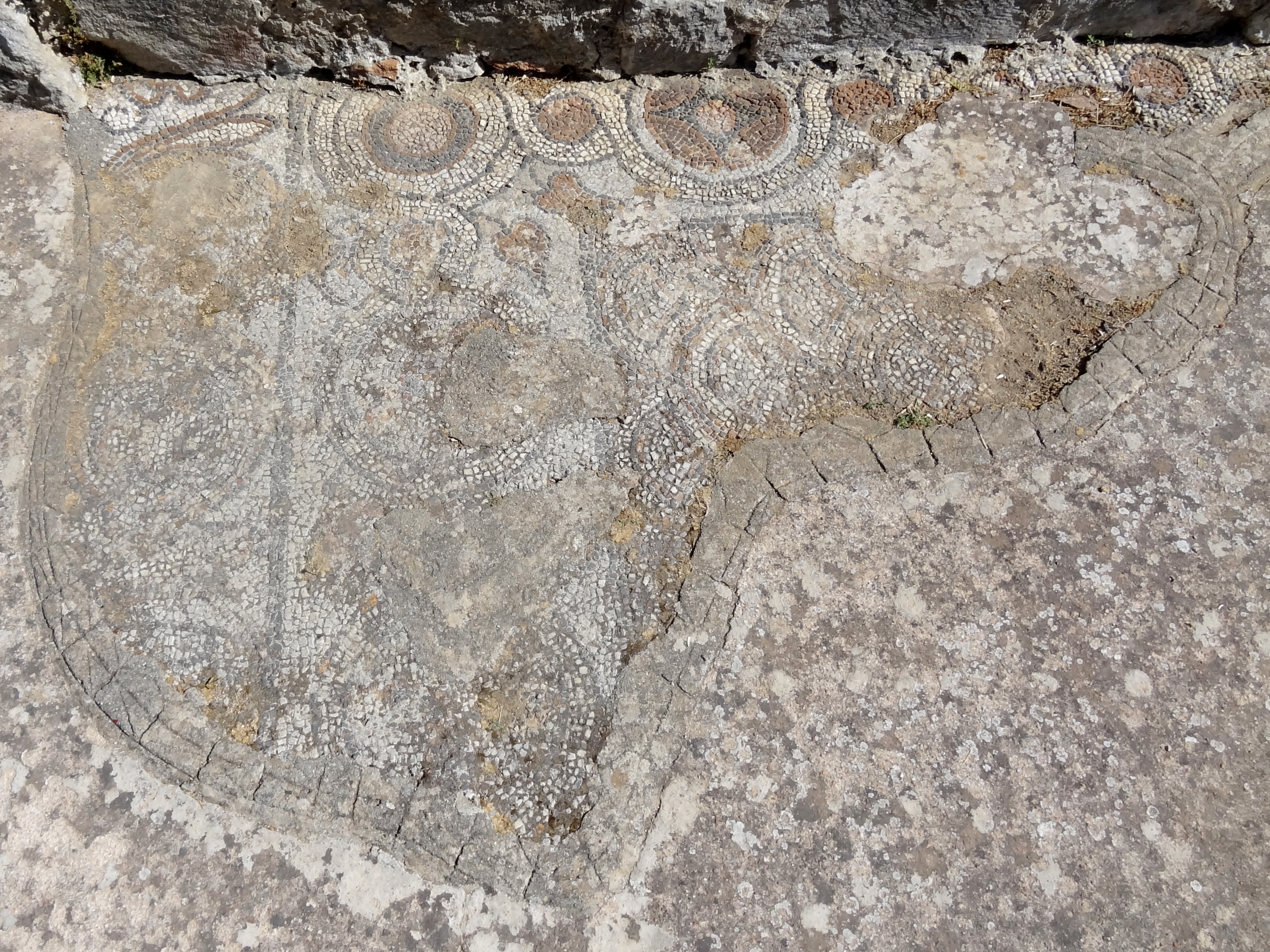 Reste der byzantinischen Basilika von Thronos, Gemeinde Amari, Kreta, Griechenland